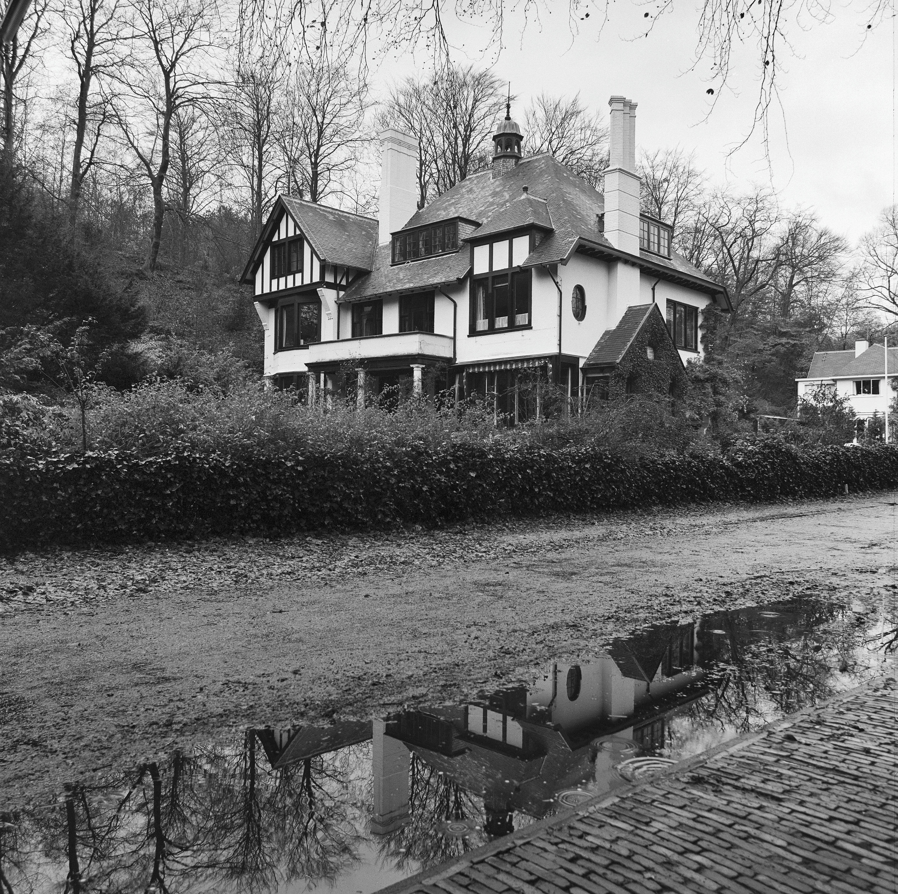 overzicht